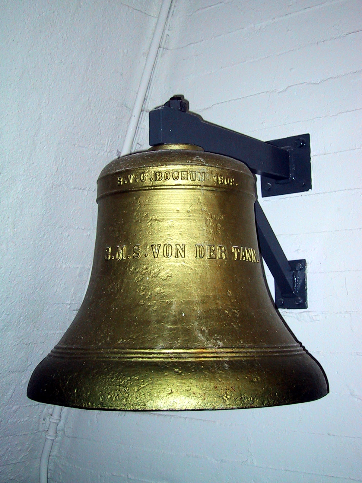 Schiffsglocke der SMS "Von der Tann" im Marineehrenmal Laboe, eine Glocke des Stahlwerkes Bochumer Verein : Ship bell of the SMS Von der Tann Source: own work Date: June 14, 2004, Laboe, Germany Author: Maschinenjunge Licence: GFDL, cc-by 3.0